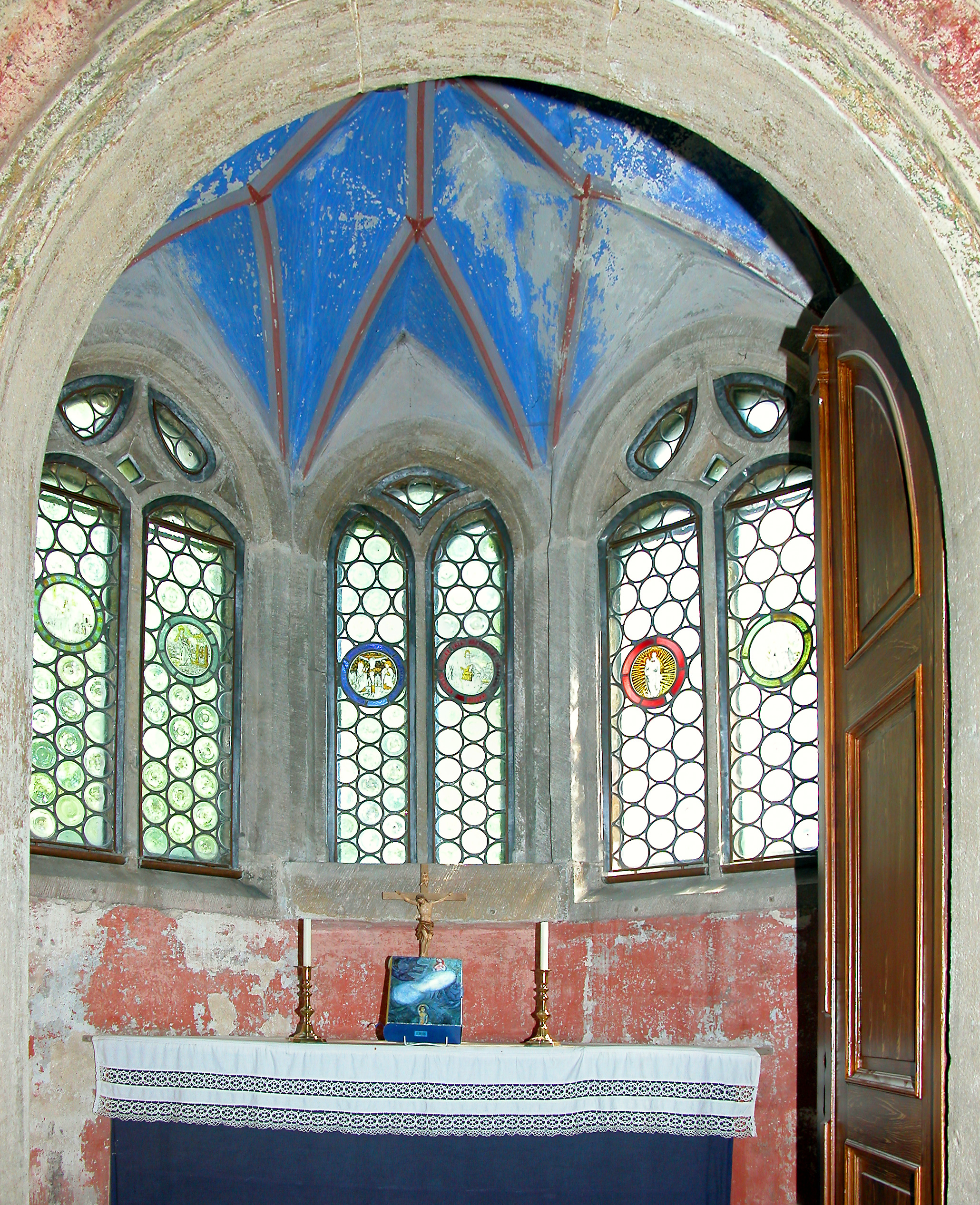 17.08.2008 01683 Heynitz (zu Nossen): Renaissanceschloß, 1519 errichtet für den geheimen Rat und Kammerherrn Nicolaus von Heynitz. Später mehrfach verändert. Kapelle im 2. Obergeschoß, hier der Chor im Erker. Seit 2004 im Besitz der Familie von Watzdorf und einem Förderverein. [DSCN33829-22830.TIF]20080817360MDR.JPG(c)Blobelt